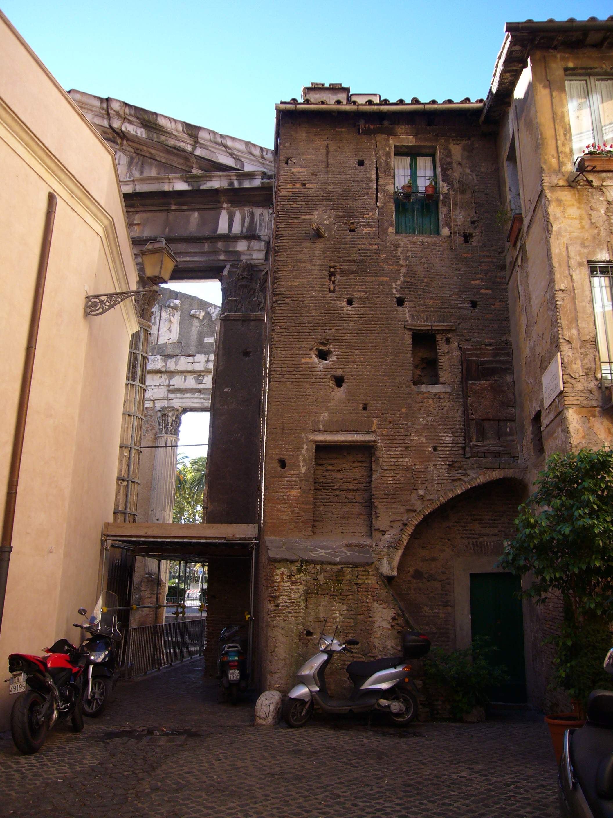 Roma, Torre dai Grassi al Portico di Ottavia